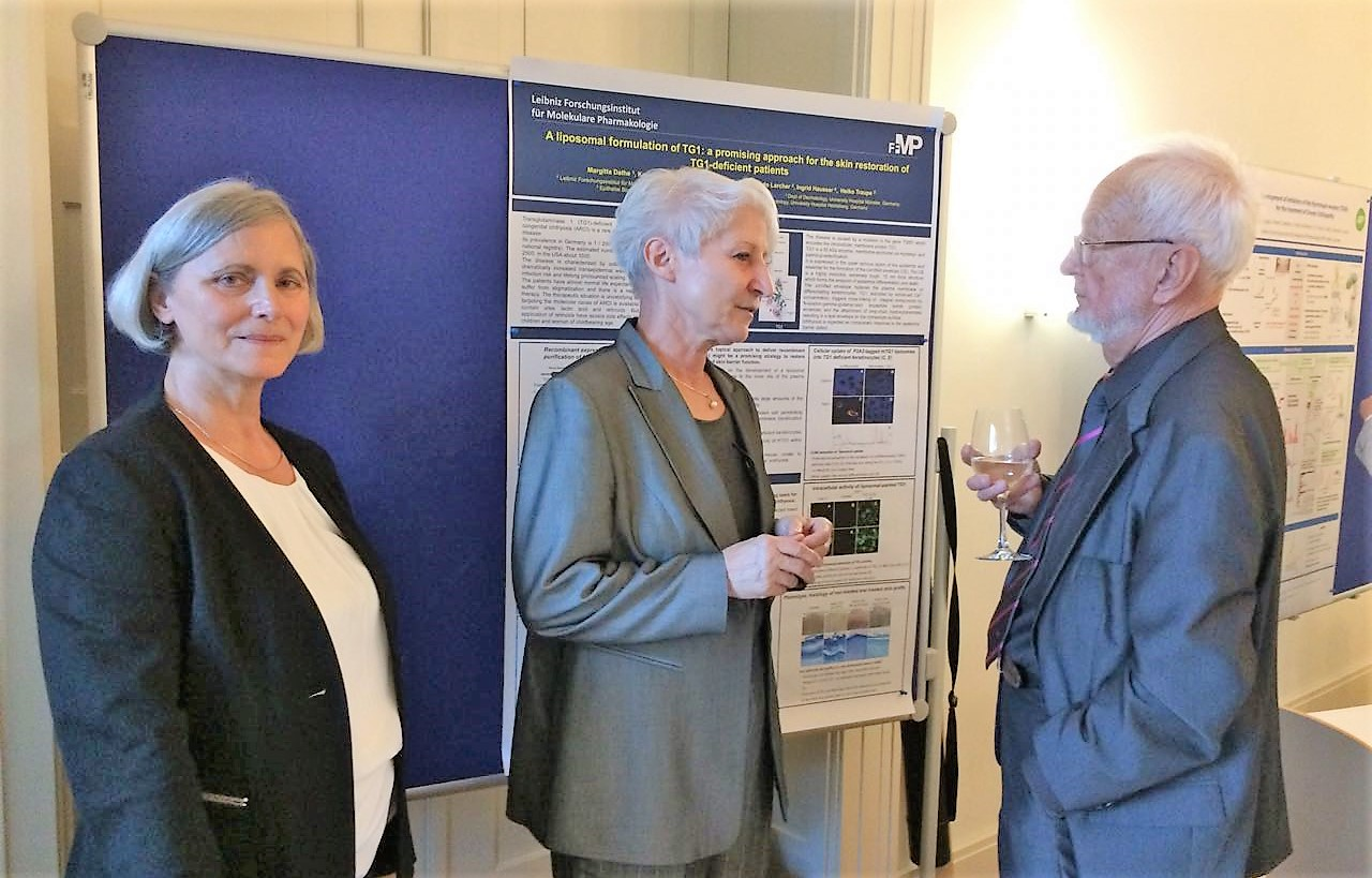 Peter Oehme, 25 Jahre FMP, Forschungspräsentation (2017)